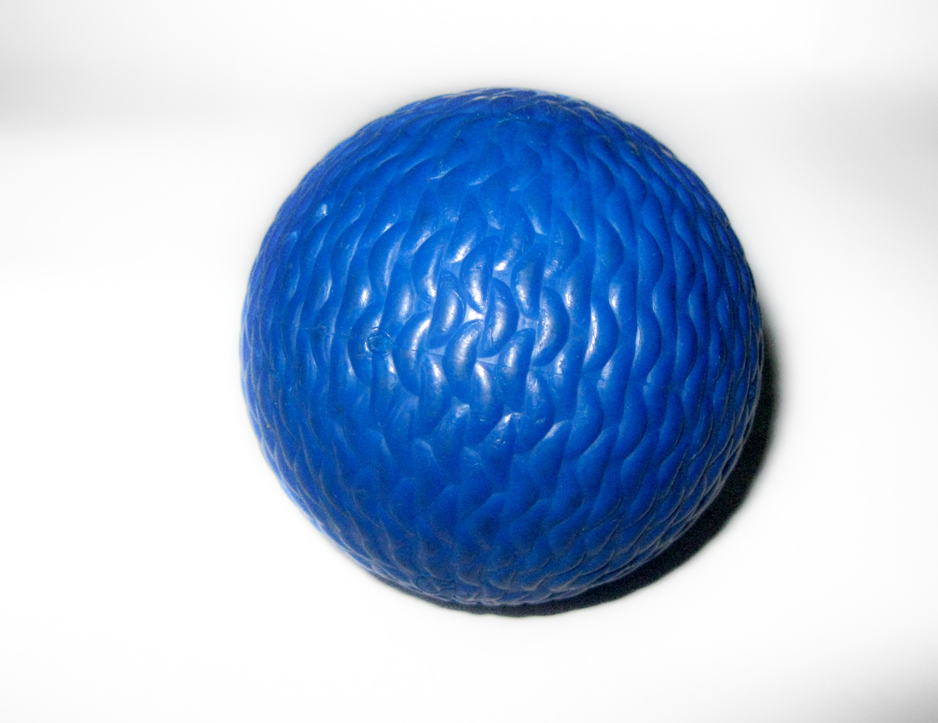 Sininen kaukalopallo.